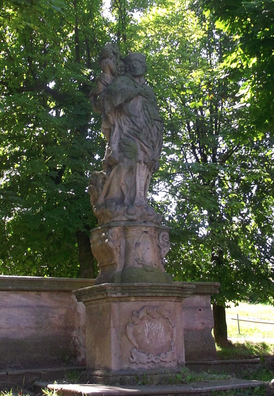 Chełmsko Śląskie, miasto